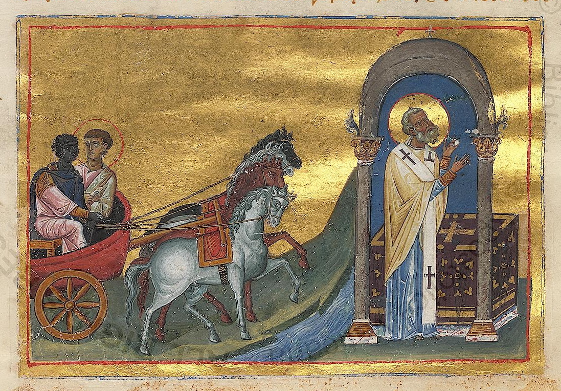 Ап. Филипп. Миниатюра из Минология Василия II. Мастер Георгий (Fol. 107)